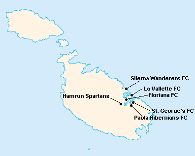 Répartition des clubs en First Division Maltaise 1966-1967.